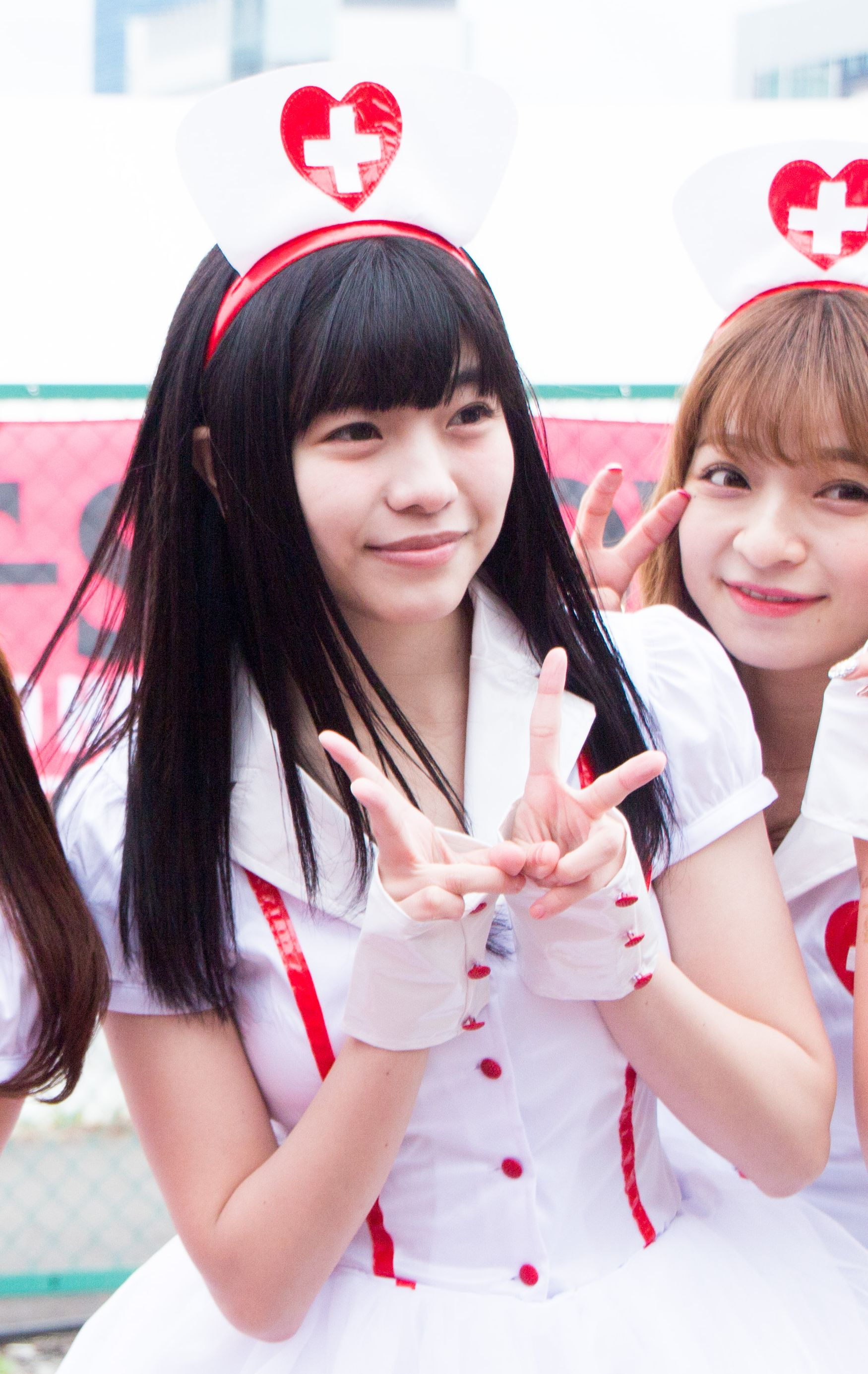 This file has been extracted from another file: T-SPOOK 2016 Keira Hinako, Funaki Saori, Taguchi Miiro, Ishikawa Natsumi, Miyatani Yue & Arakawa Yuuna (Akishibu Project) (33773957632).jpg